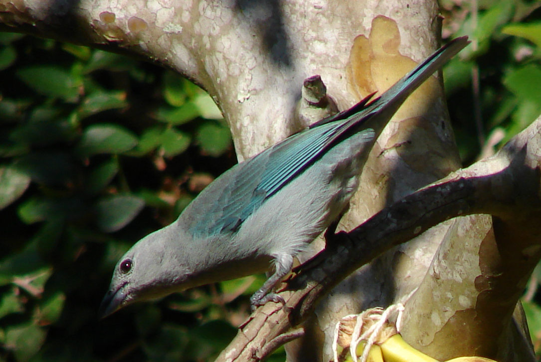 Sayaca tanager, (Thraupis sayaca) (Pt-br=sanhaço do mamoeiro)